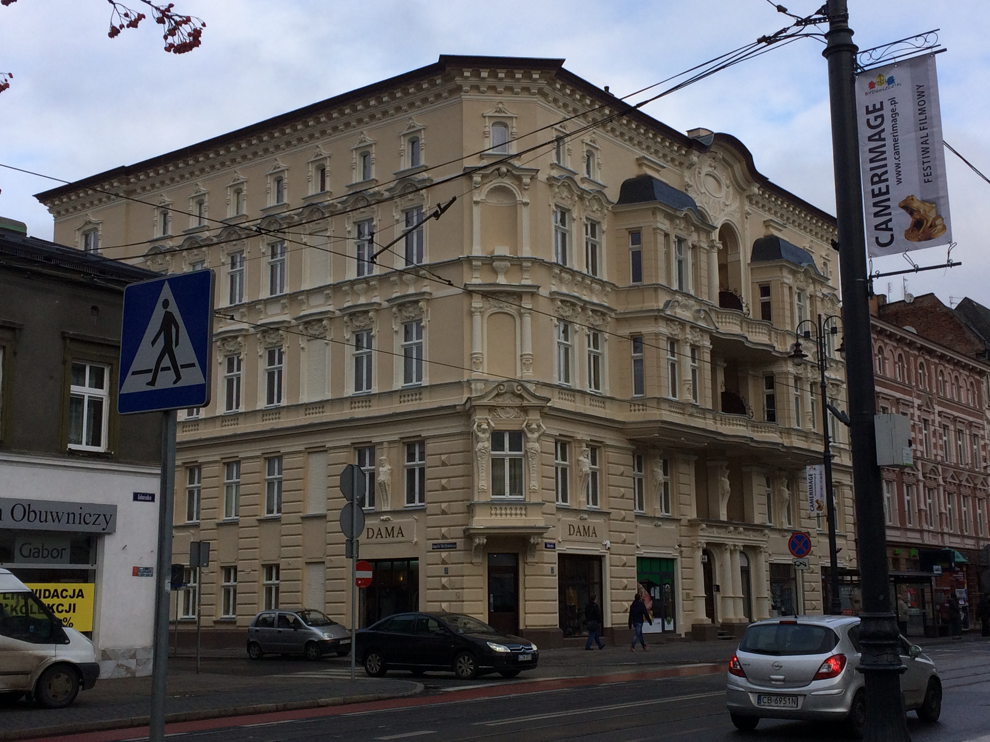 Kamienica J. Święcickiego - ul. Gdańska 63 w Bydgoszczy